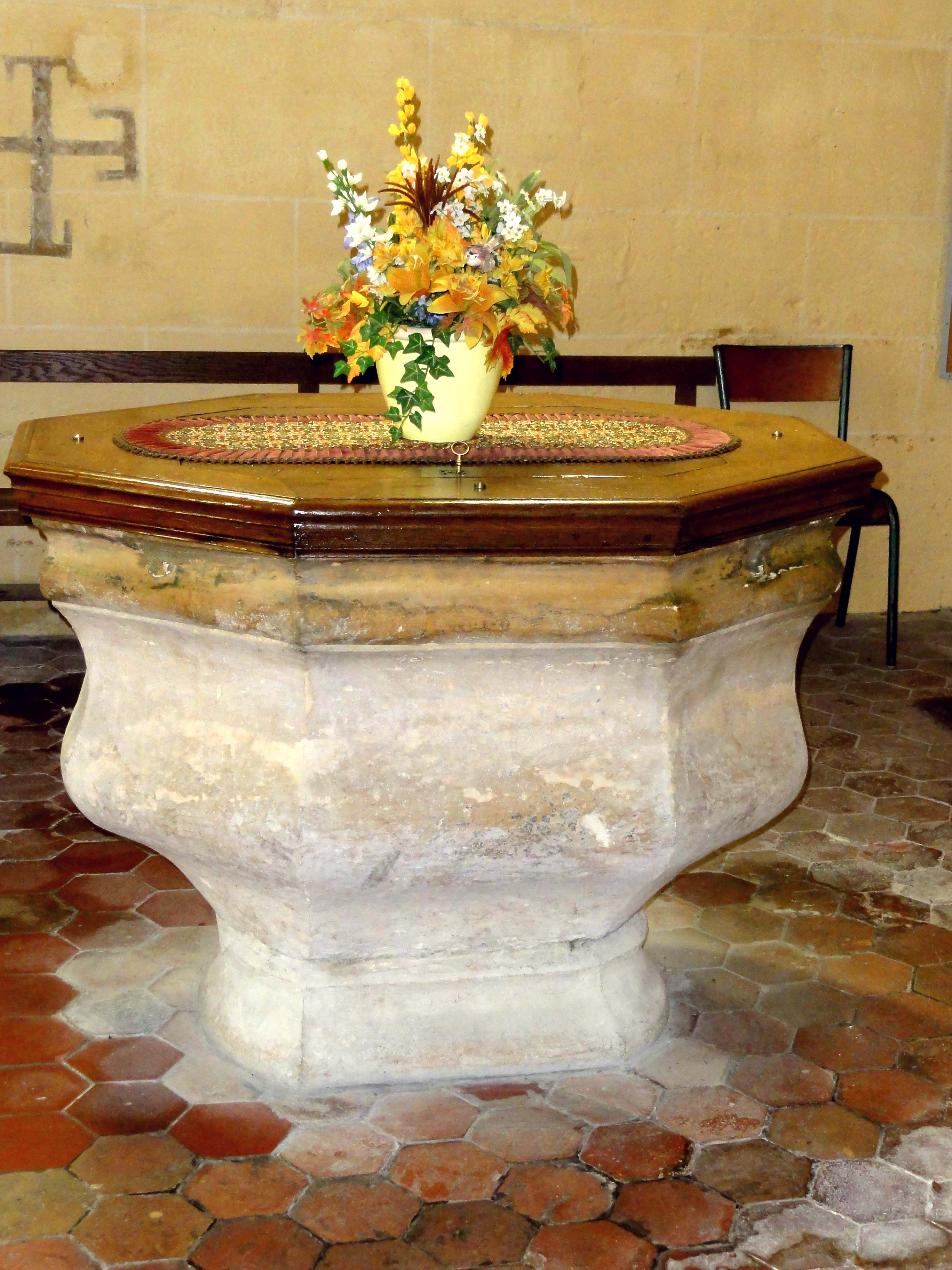 Fonts baptismaux.